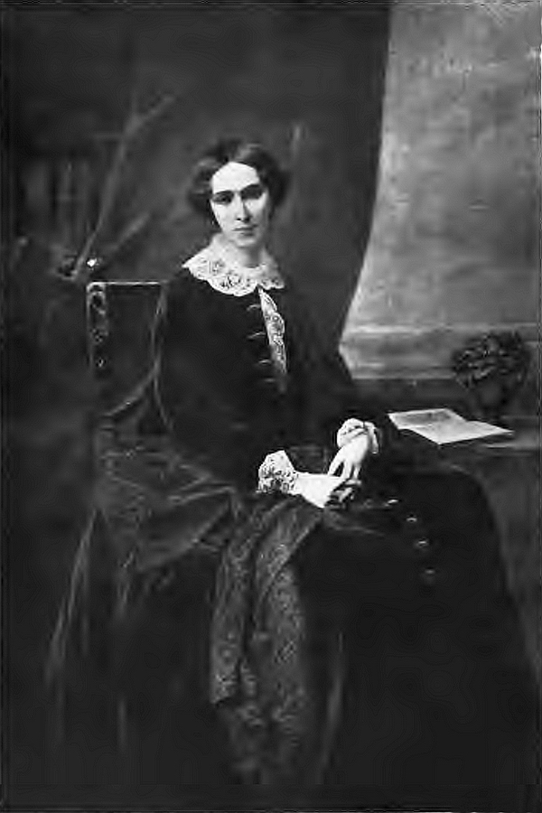 La comédienne Rachel (Rachel Félix)